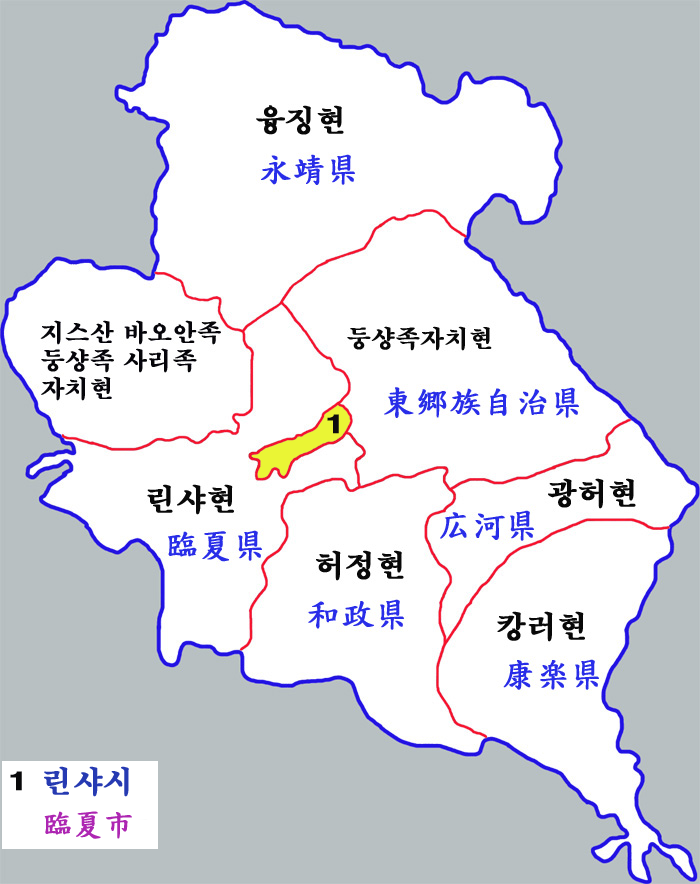 린샤후이족자치주 현급구역